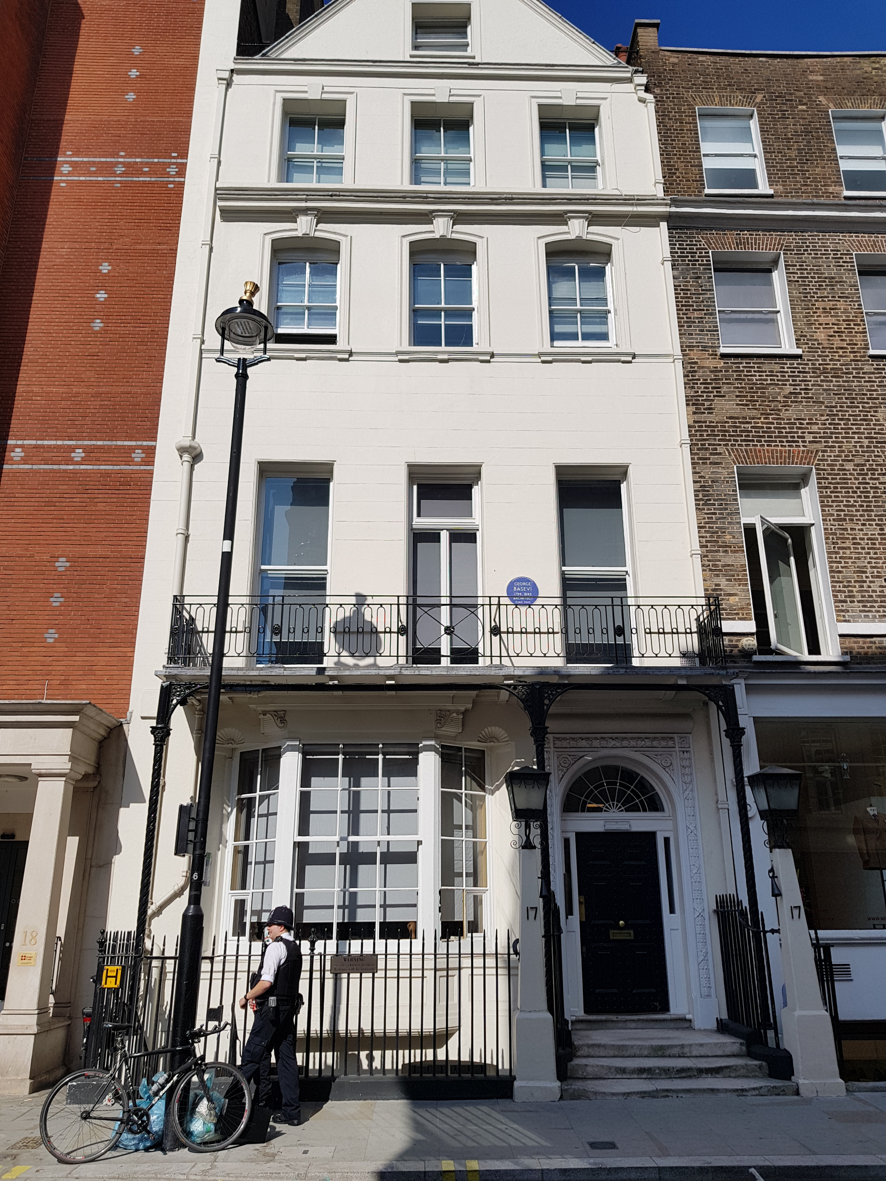 17 Savile Row, Londres. L'architecte George Basevi (1794-1845) vécut à cette adresse.